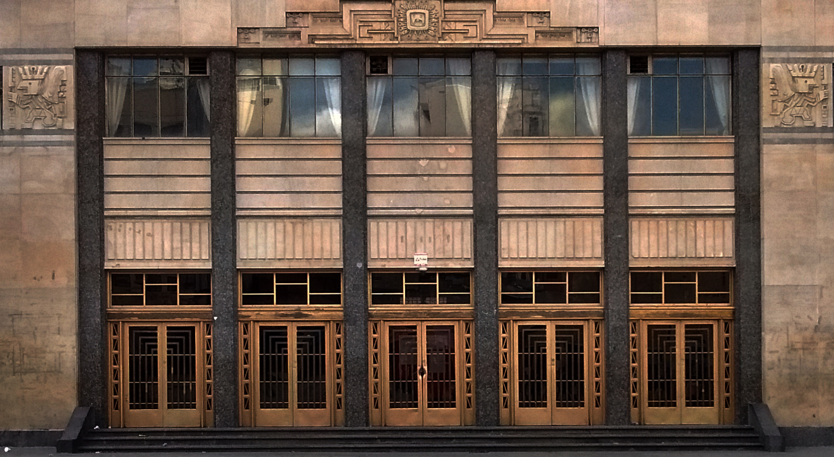 Fachada Universidad Mayor de San Andres This medium shows the protected monument with the number L/00-136 in Bolivia.